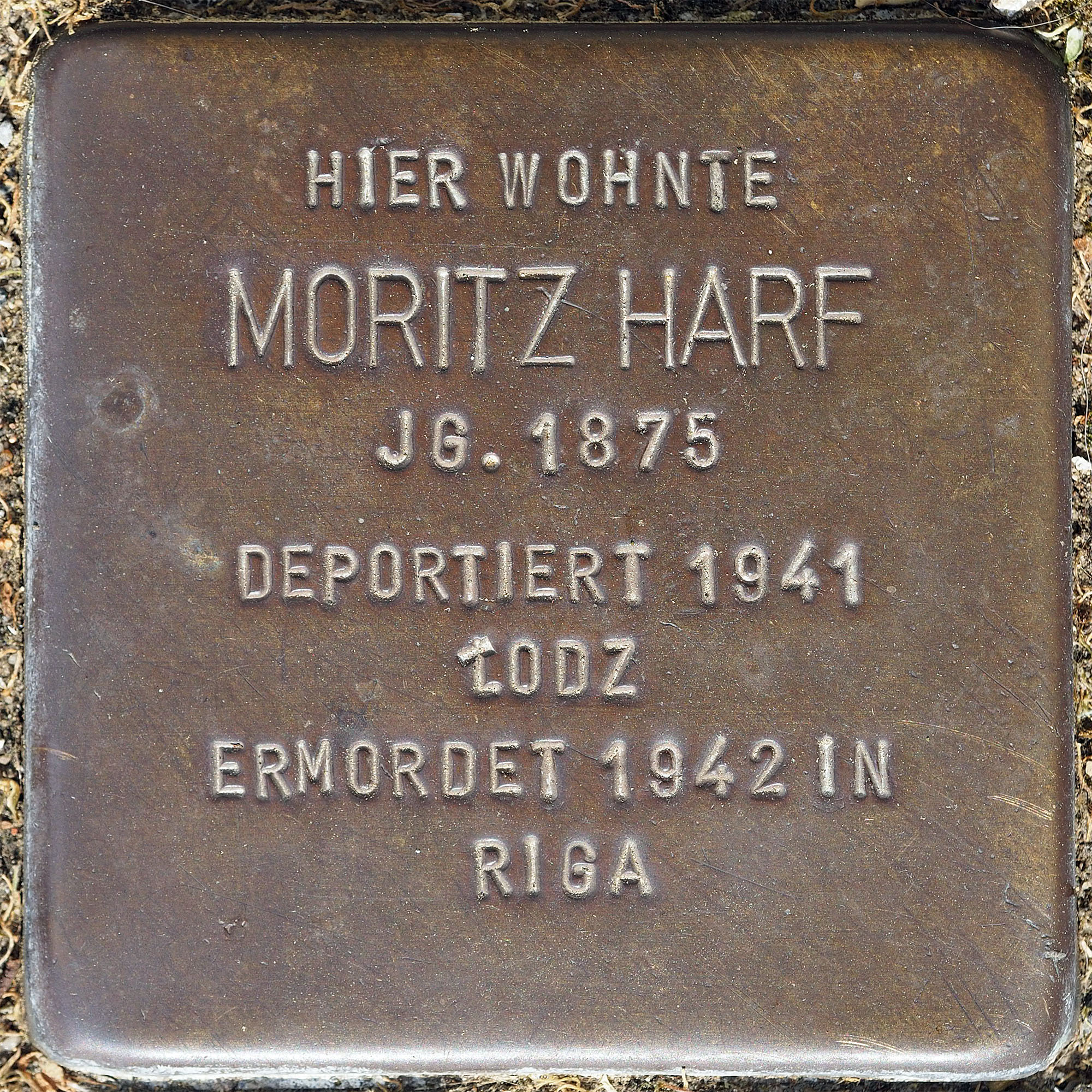 Stolpersteine MG: Harf, Moritz